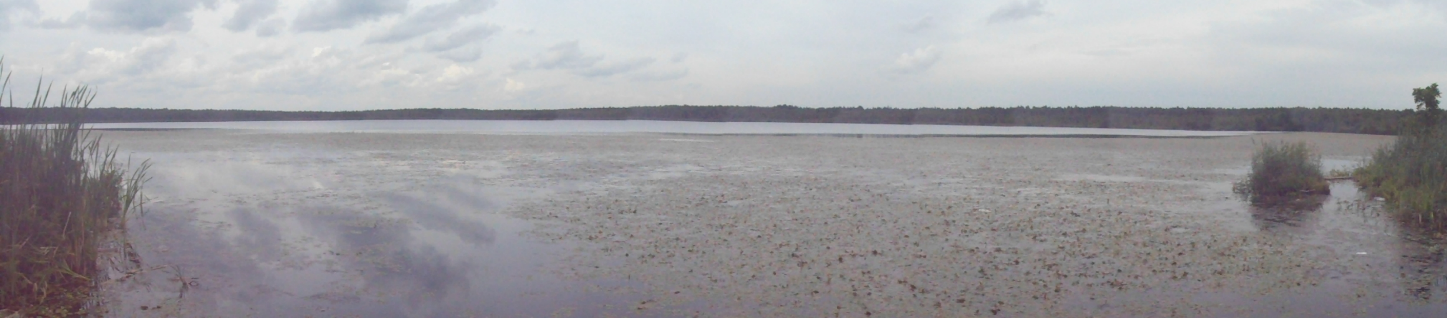 Панорама Нерского озера (д. Озерецкое). Лето 2013 г.